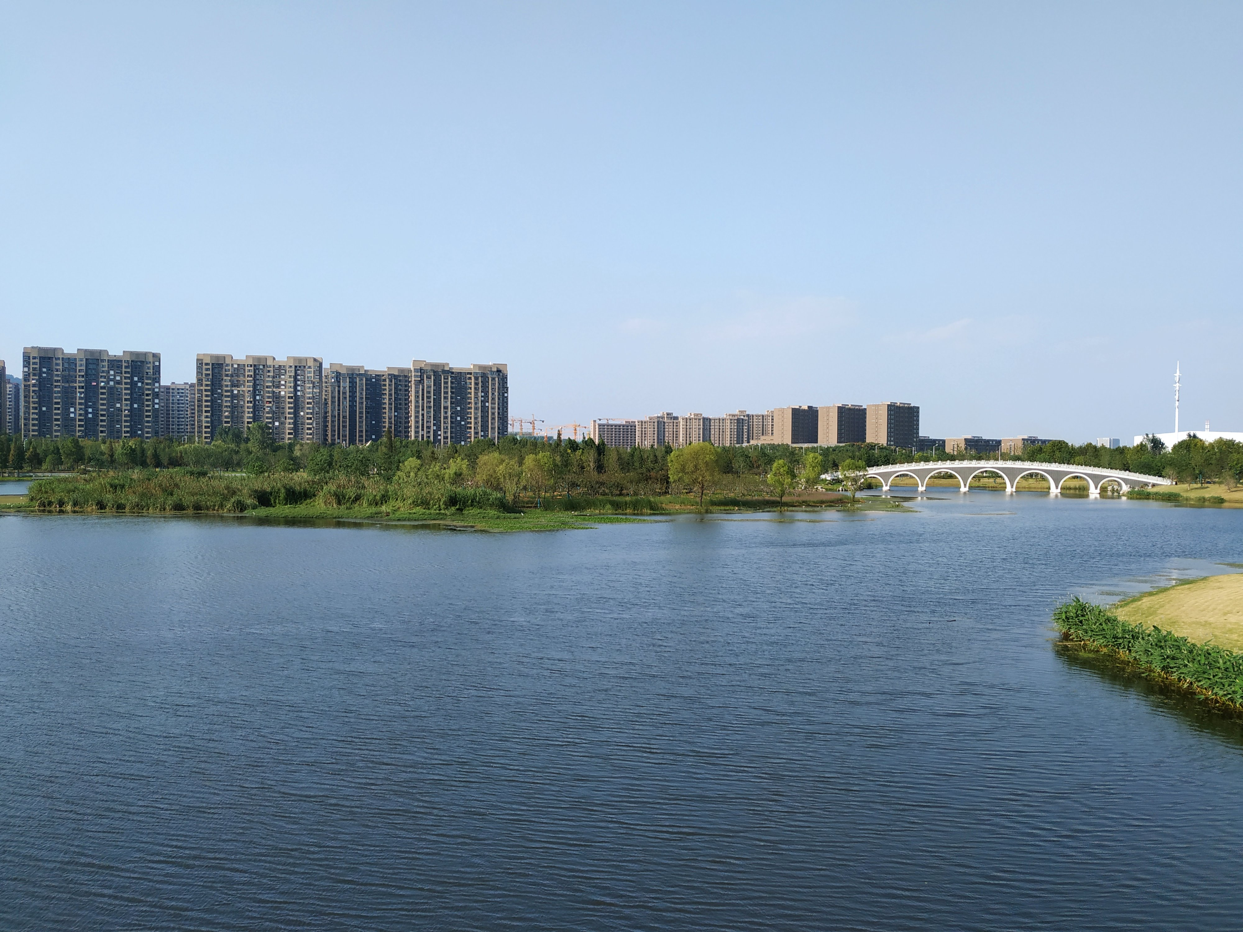 中文（中国大陆）: 南京市仙林湖